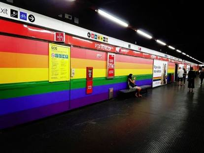 Parete con decorazione arcobaleno.